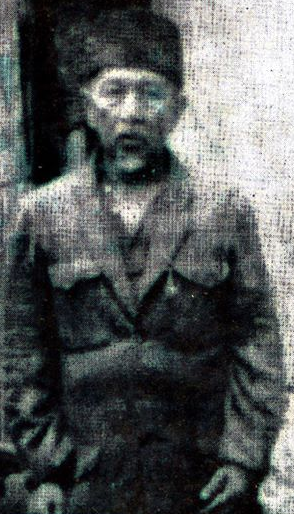 Kiagus Muhammad Saleh (Kyai Saleh Lateng),Salah Satu Tokoh Revolusi Banyuwangi